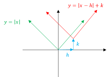 خلاصه تابع قدرمطلق و انتقالش